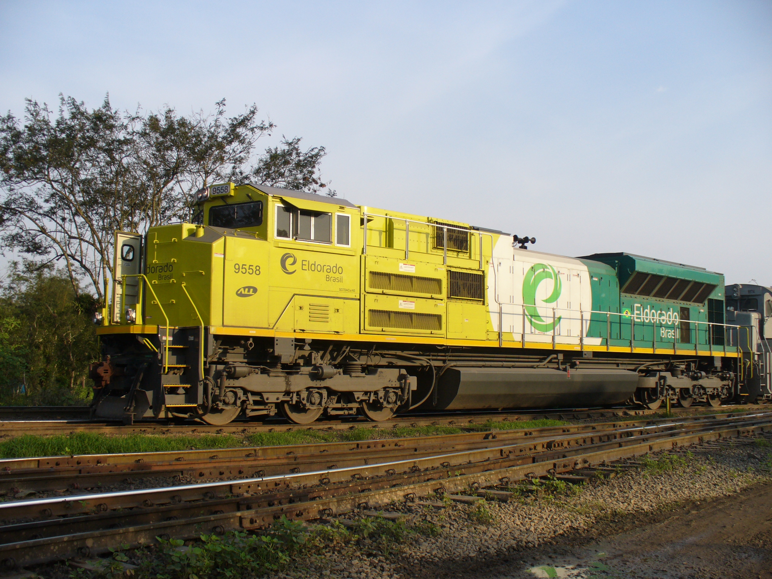 Locomotiva diesel-elétrica modelo EMD SD70ACe45 9558 Eldorado - Paratinga-SP